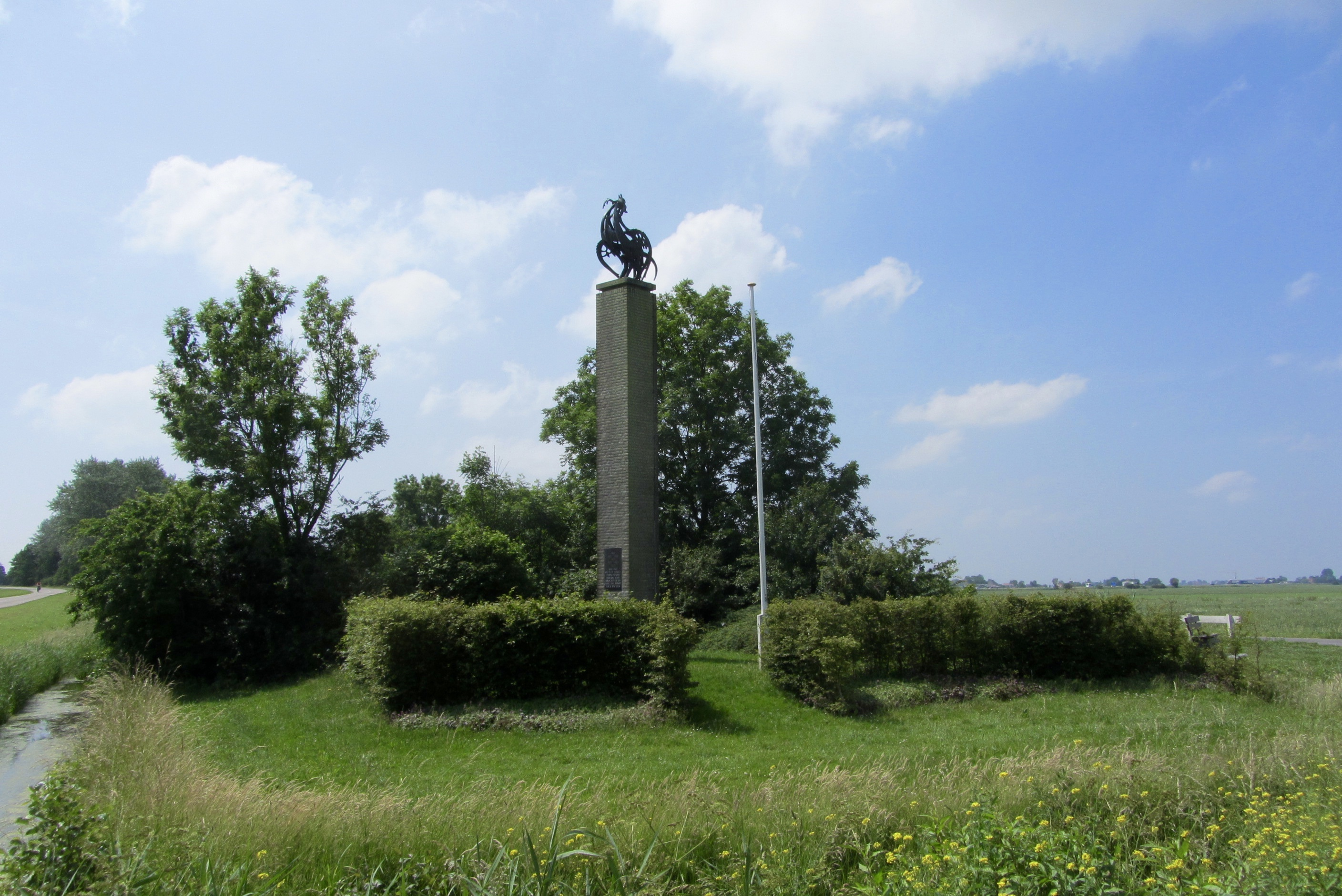 Willem Valk,1951